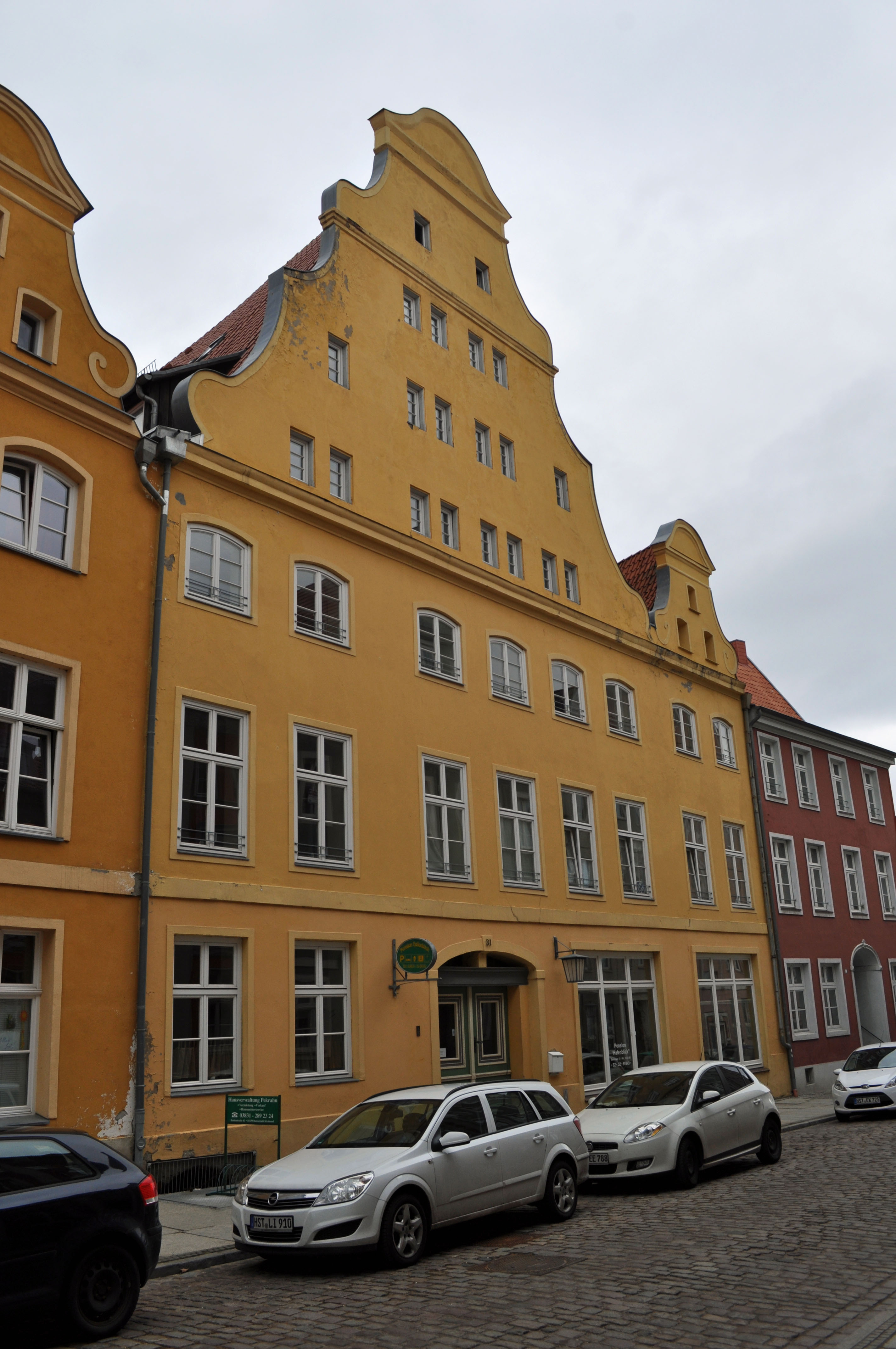 Gebäude bzw. Gebäudedetail in Stralsund. Straße und Hausnummer siehe Dateiname.